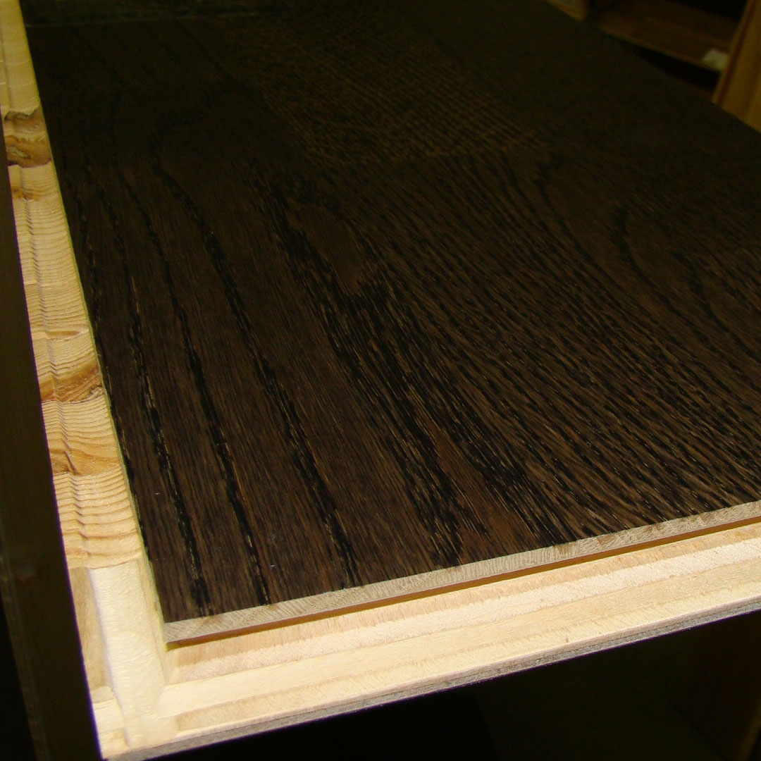 Трехслойная паркетная доска из тонированного дуба